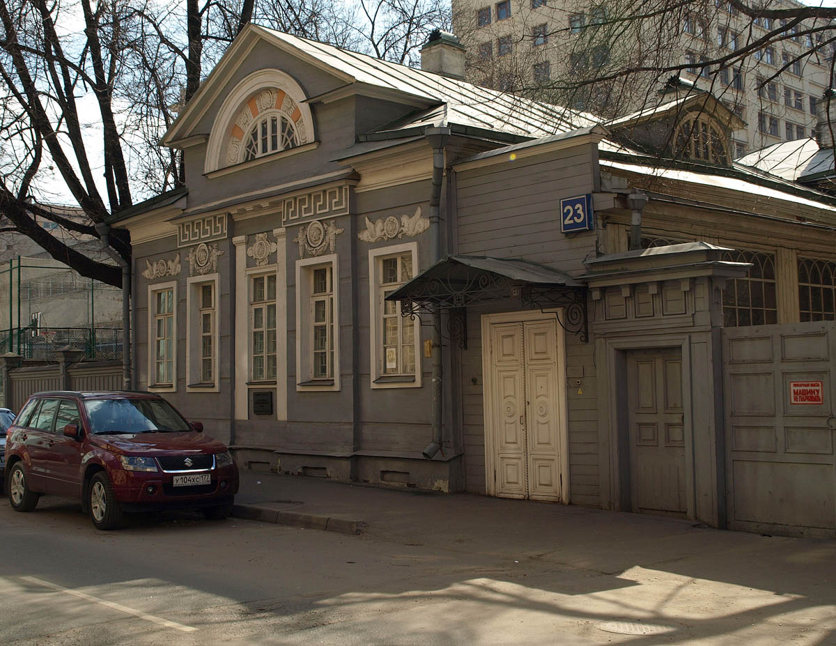 Burdenko Street, Moscow